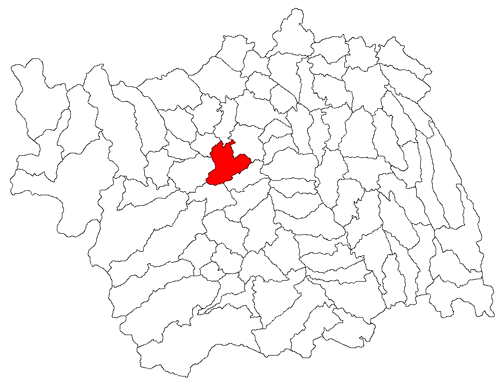 Categorie:Hărţi ale judeţului Bacău